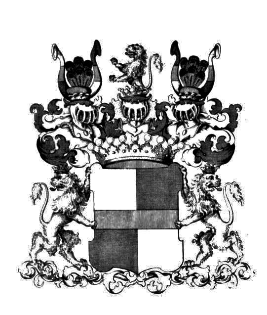 Herb von Holtzendorf